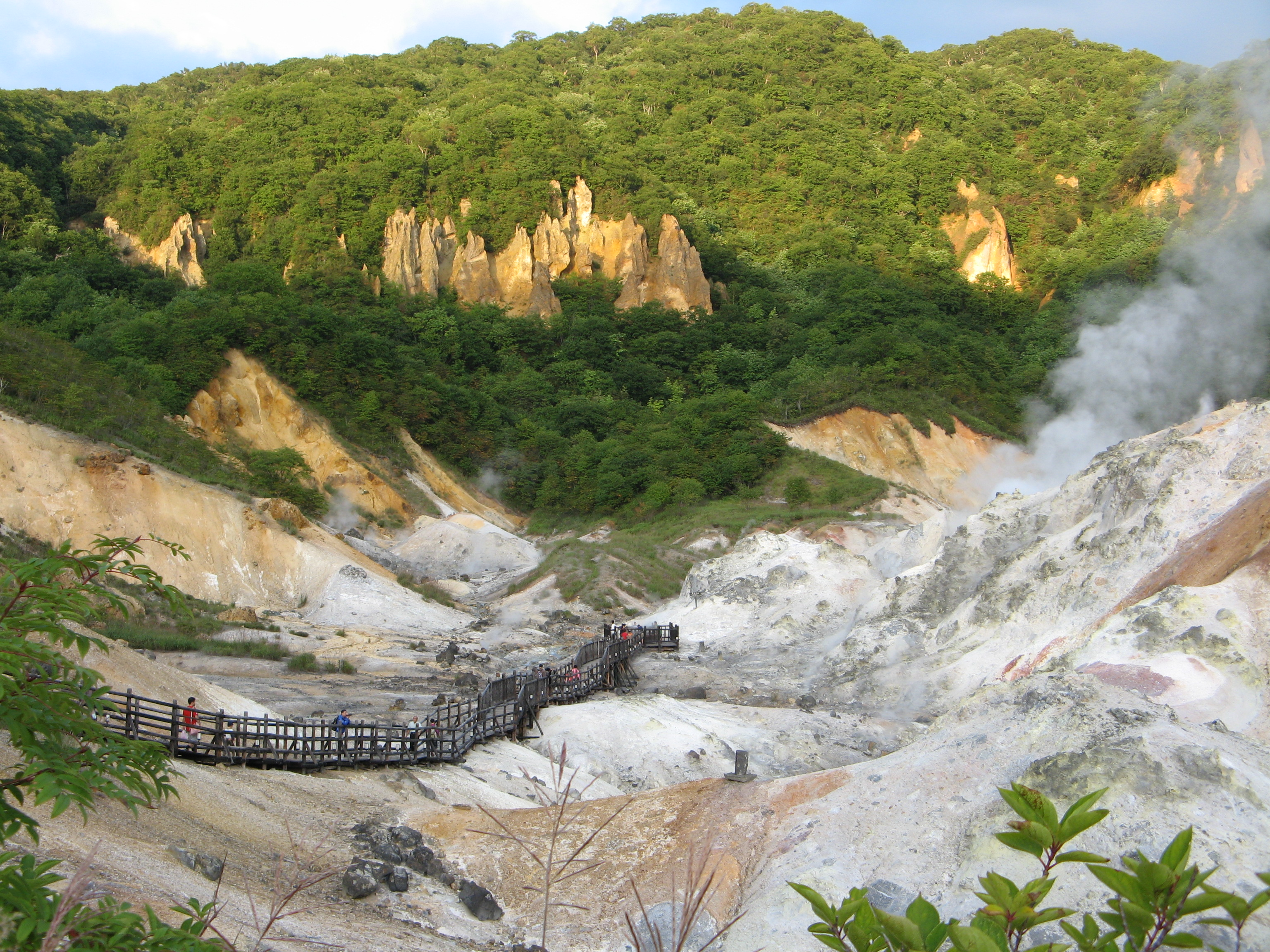 Noboribetu Jigokudani／登別温泉の源泉への道